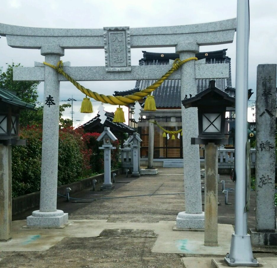 高岡市戸出石代 八幡社